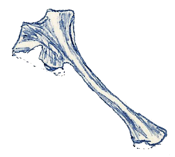 Illustration of a fossil of Marshosaurus